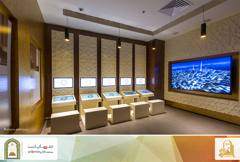 صورة من قاعة تربية الأسرة والناشئة على القرآن الكريم